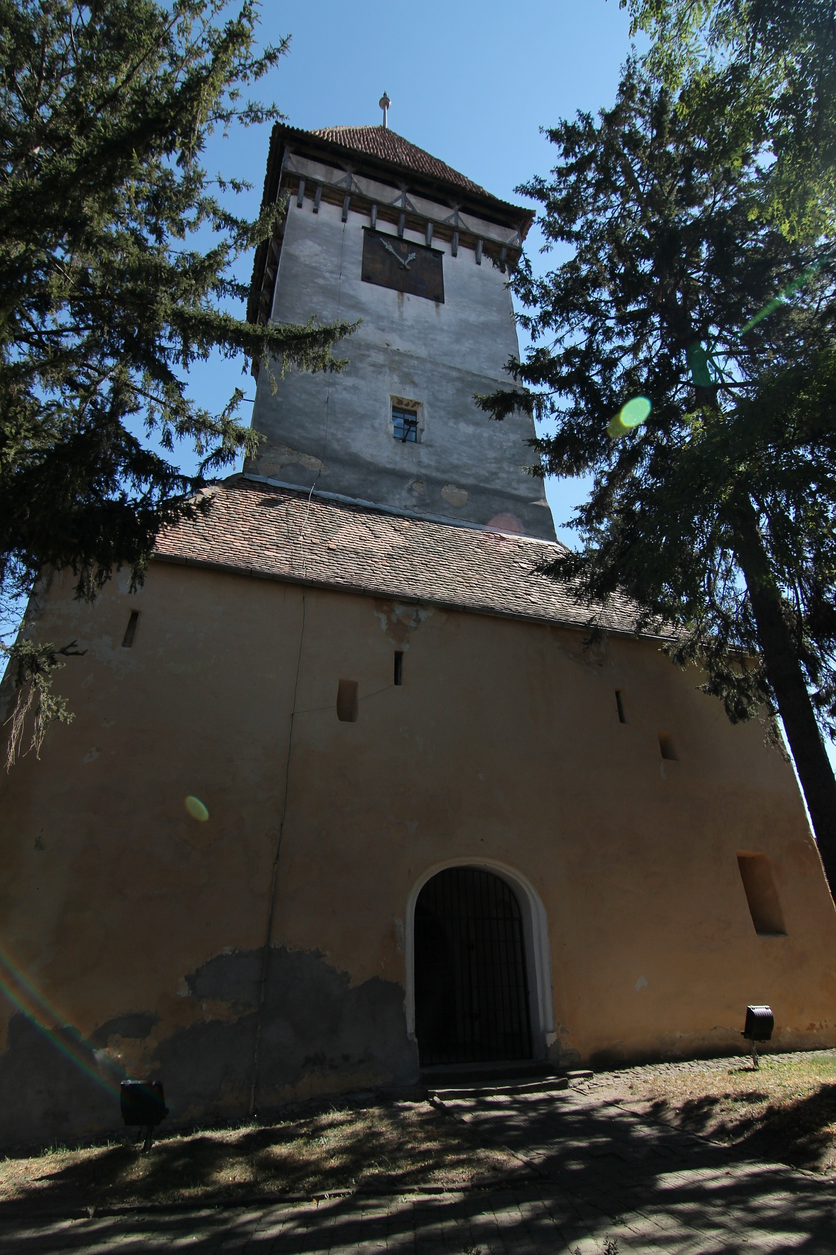 Biserica evanghelică Agnita 01